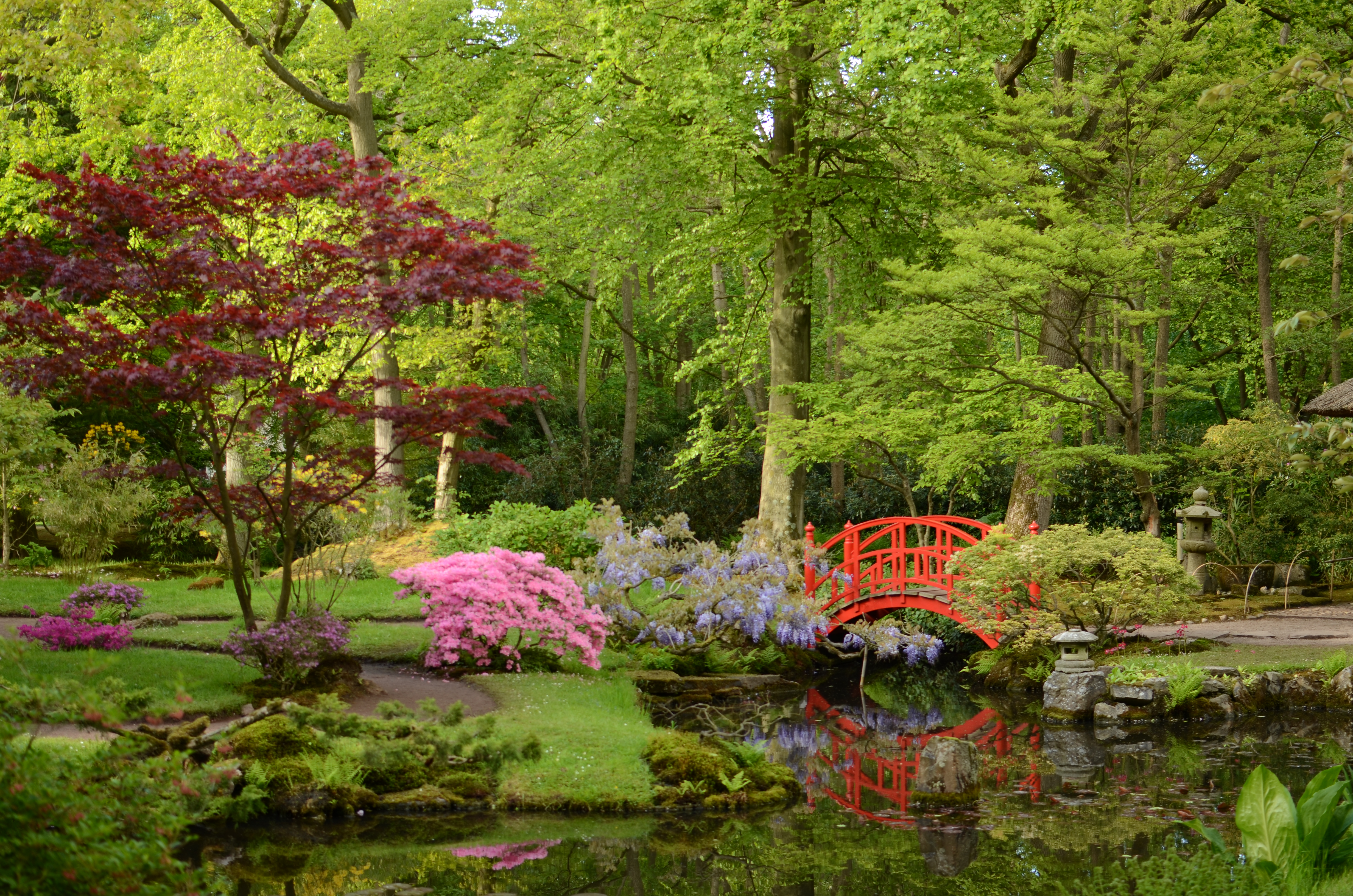 De Japanse Tuin op landgoed Clingendael in Den Haag.